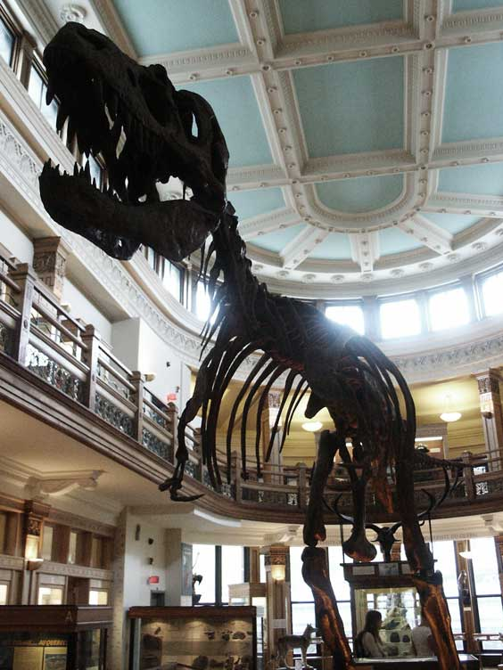 Gorgosaurus (formerly Albertosaurus) libratus skeleton.